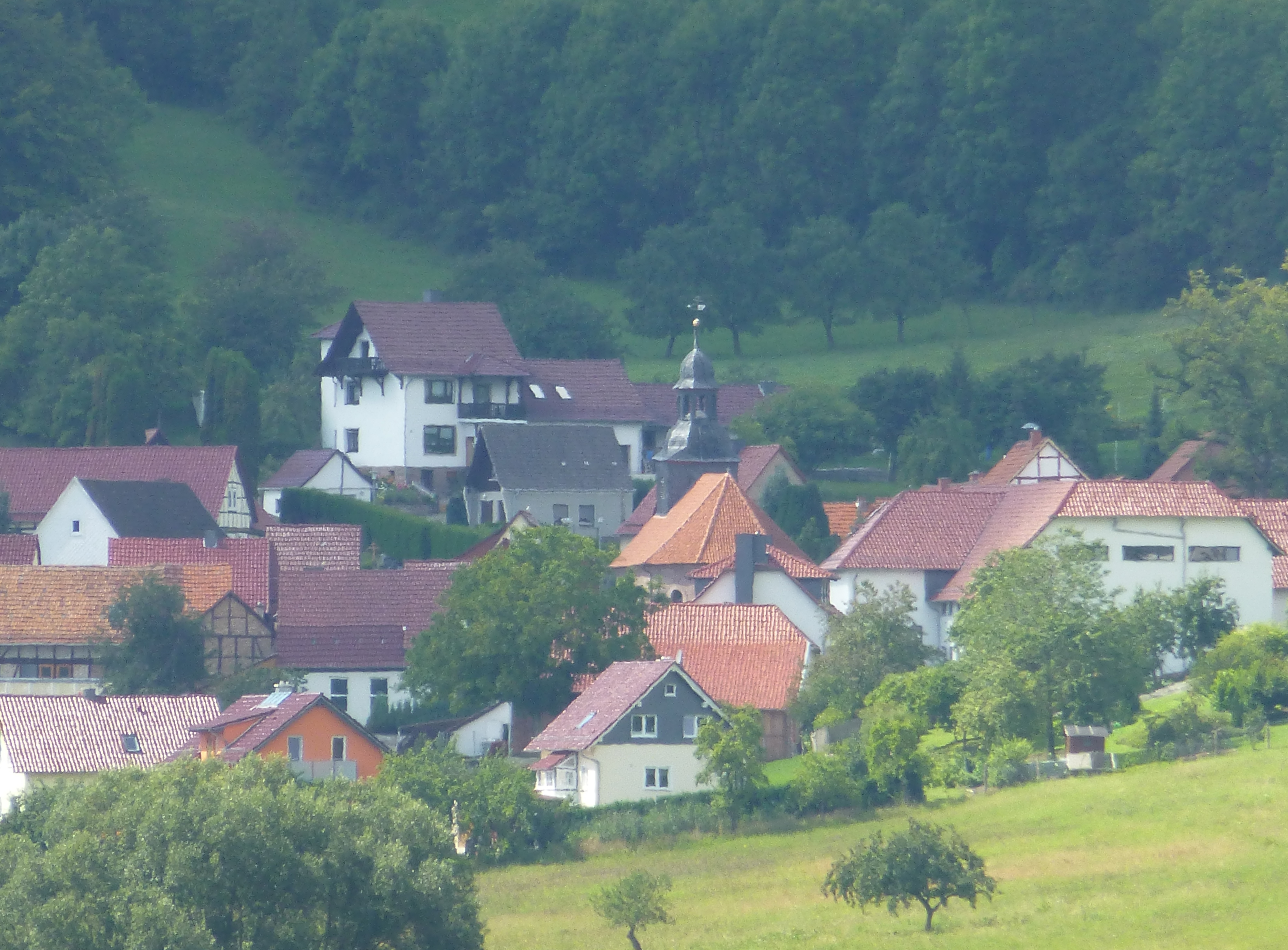 Ansicht von Röhrig mit Kirche